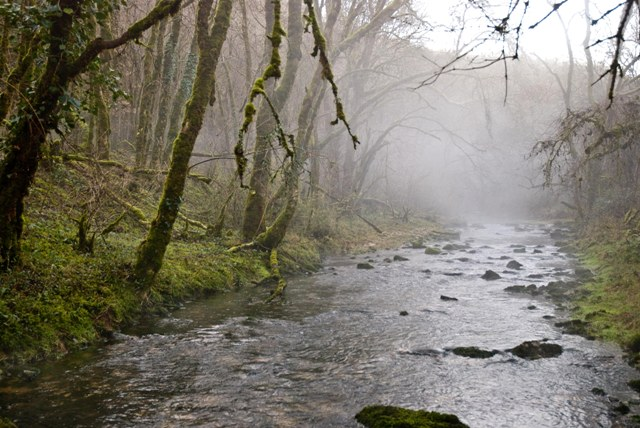 Vue du cours supérieur du Vignon, environ 100 m en aval de la source, en hiver.